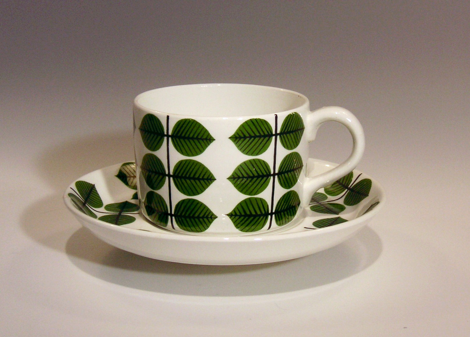 Stig Lindbergs tekopp "Berså"